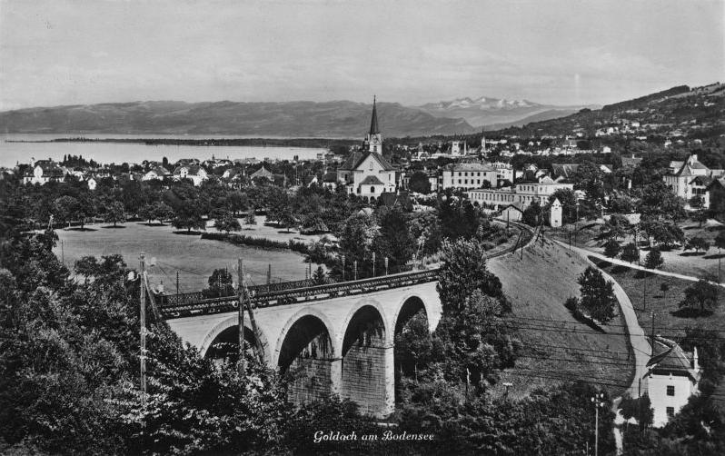 Eisenbahnviadukt der SBB über die Goldach, im Hintergrund das Dorf Goldach